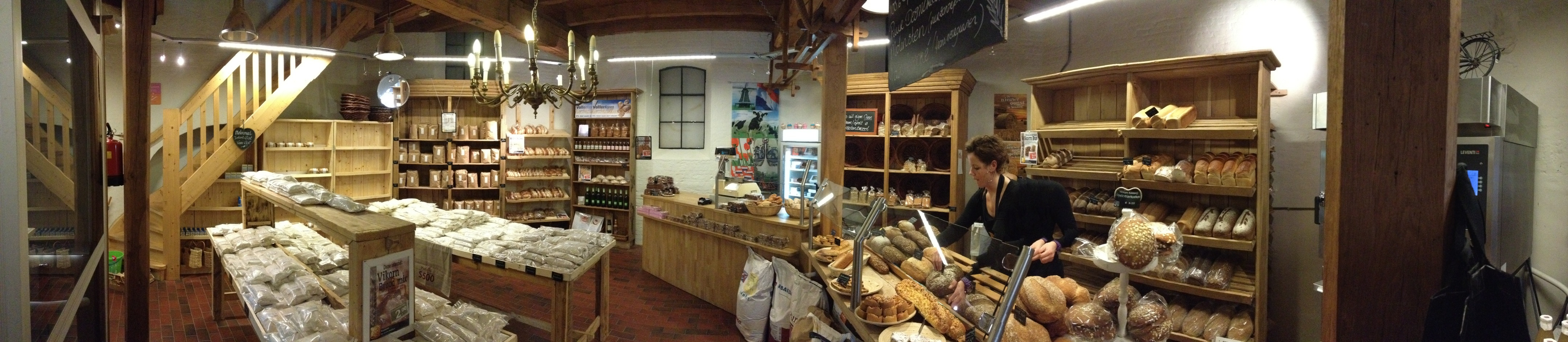 Ambachtelijke bakkerij met meelhandel, St. Annamolen, Nijmegen